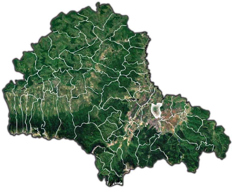 Sanpetru jud Brasov